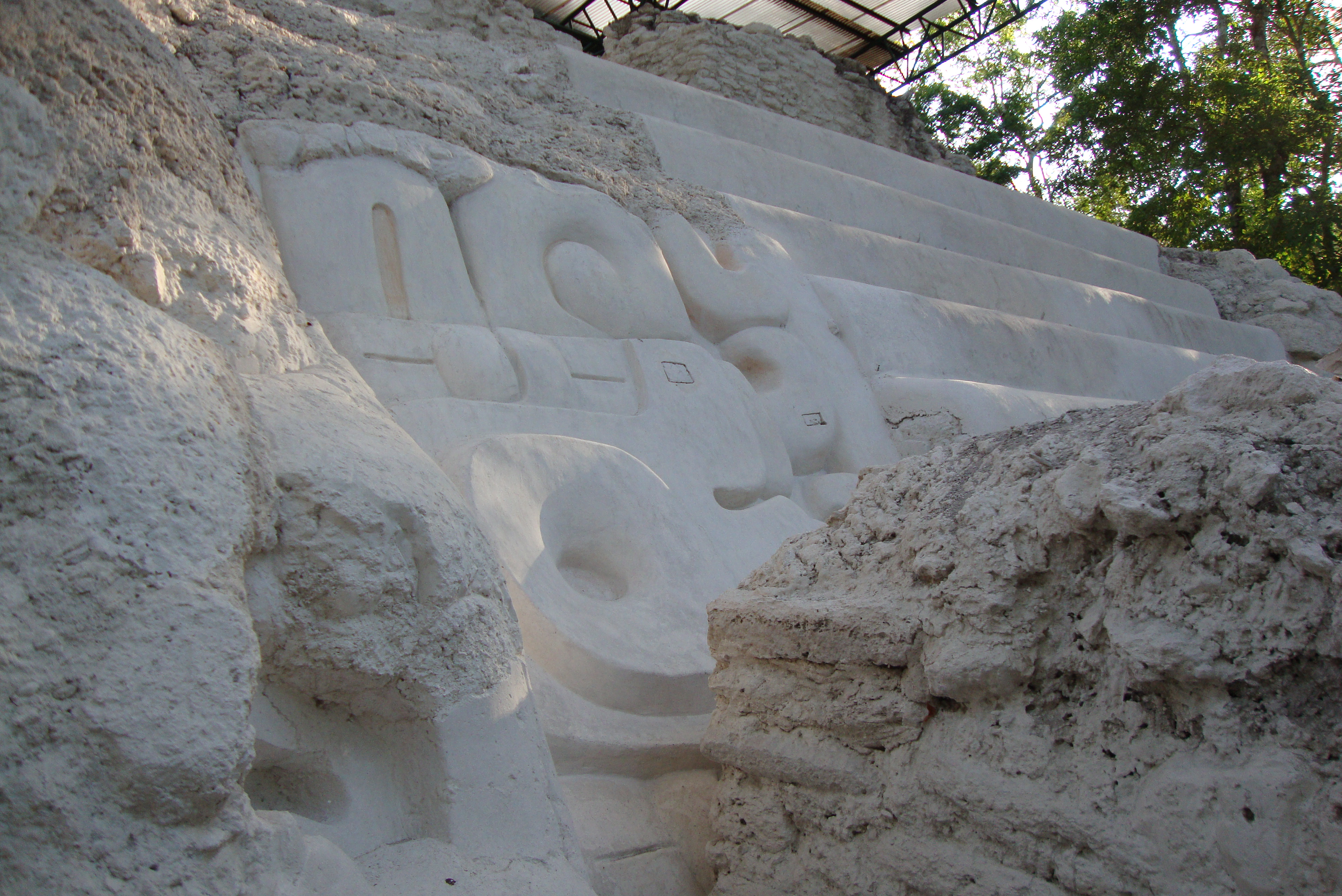 Fotografía de la estructura 34 de El Mirador, Petén, Guatemala